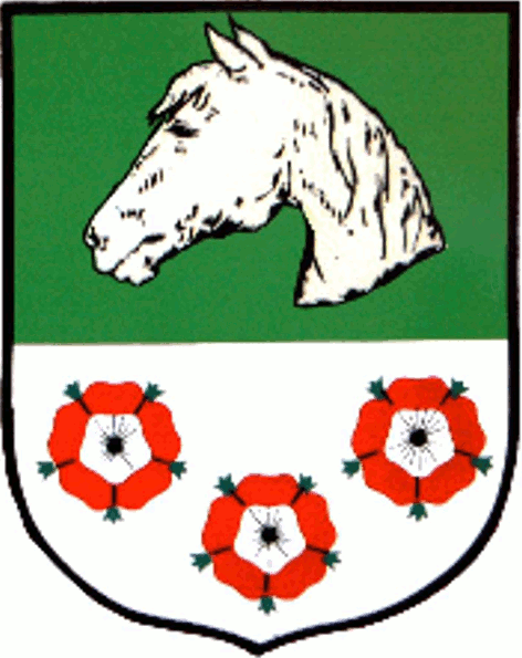 Coat of arms Hepstedt, Wappen der Gemeinde Hepstedt